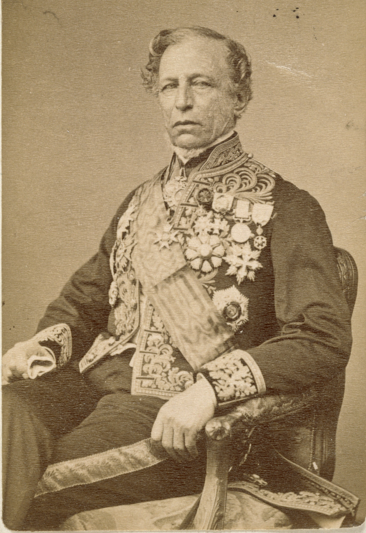 L'amiral de Chabannes